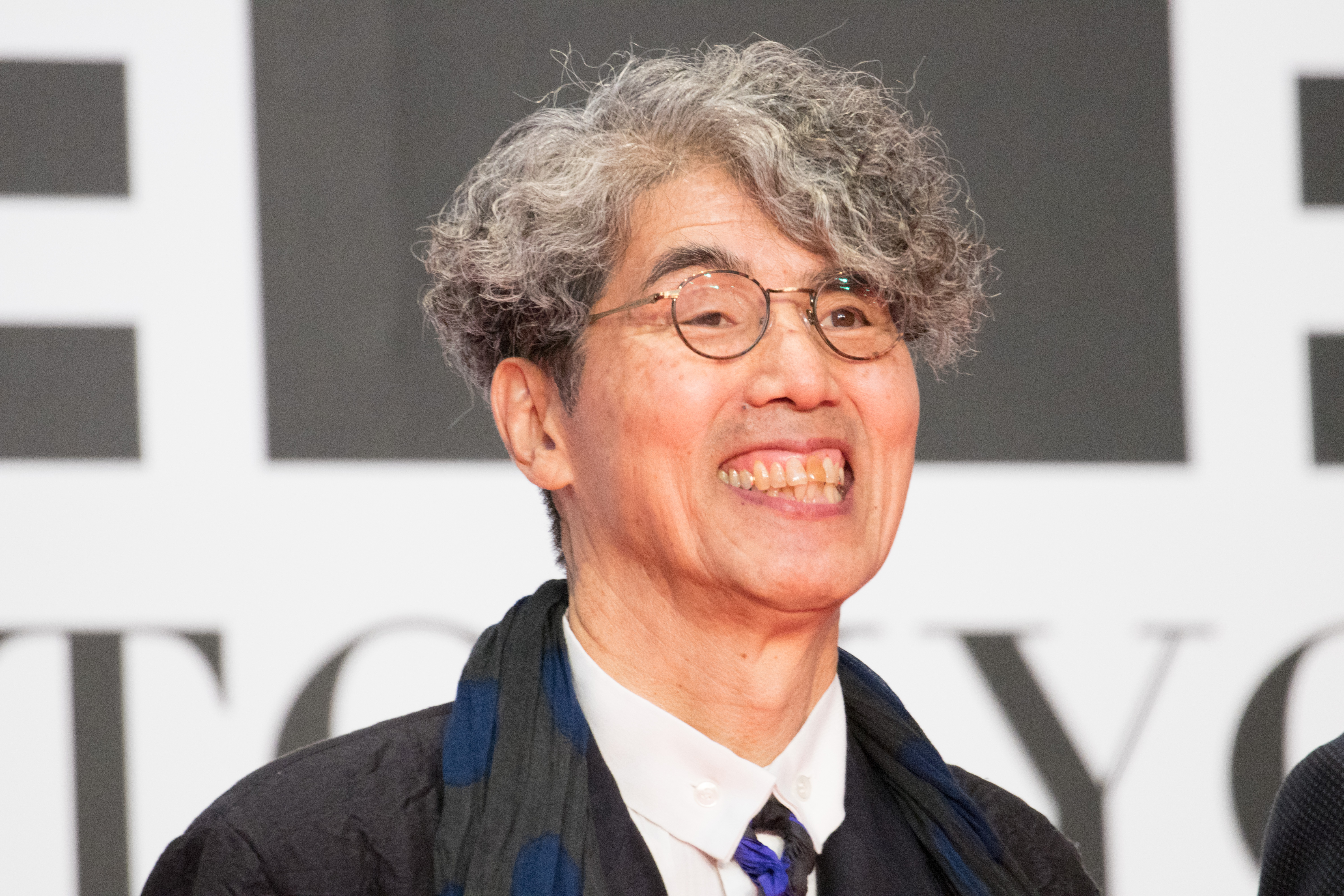 第29回 東京国際映画祭 オープニングセレモニー 安藤紘平 (湯を沸かすほどの熱い愛)